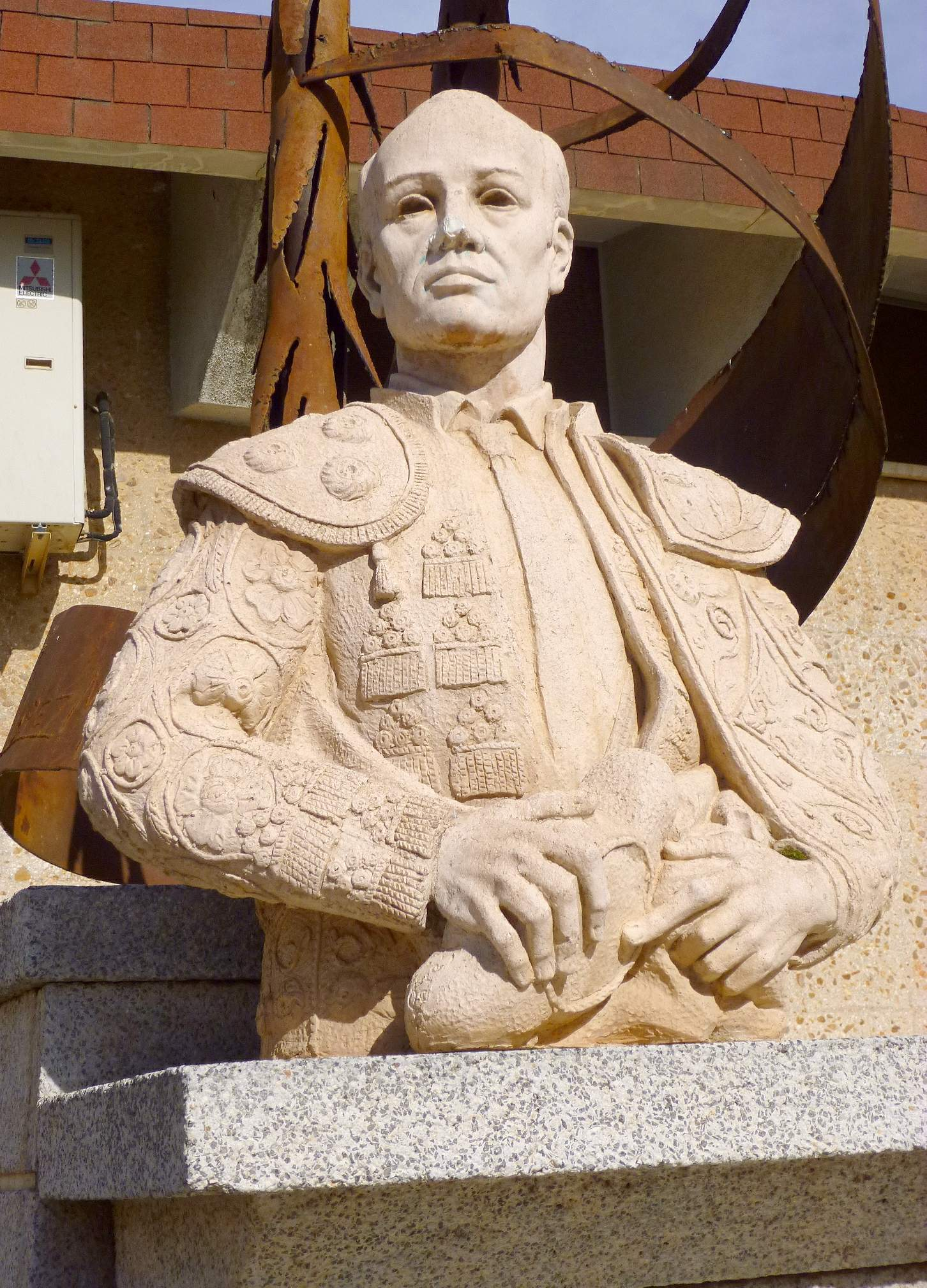 Monumento al torero Ignacio Sánchez Mejías (Manzanares, Ciudad Real)